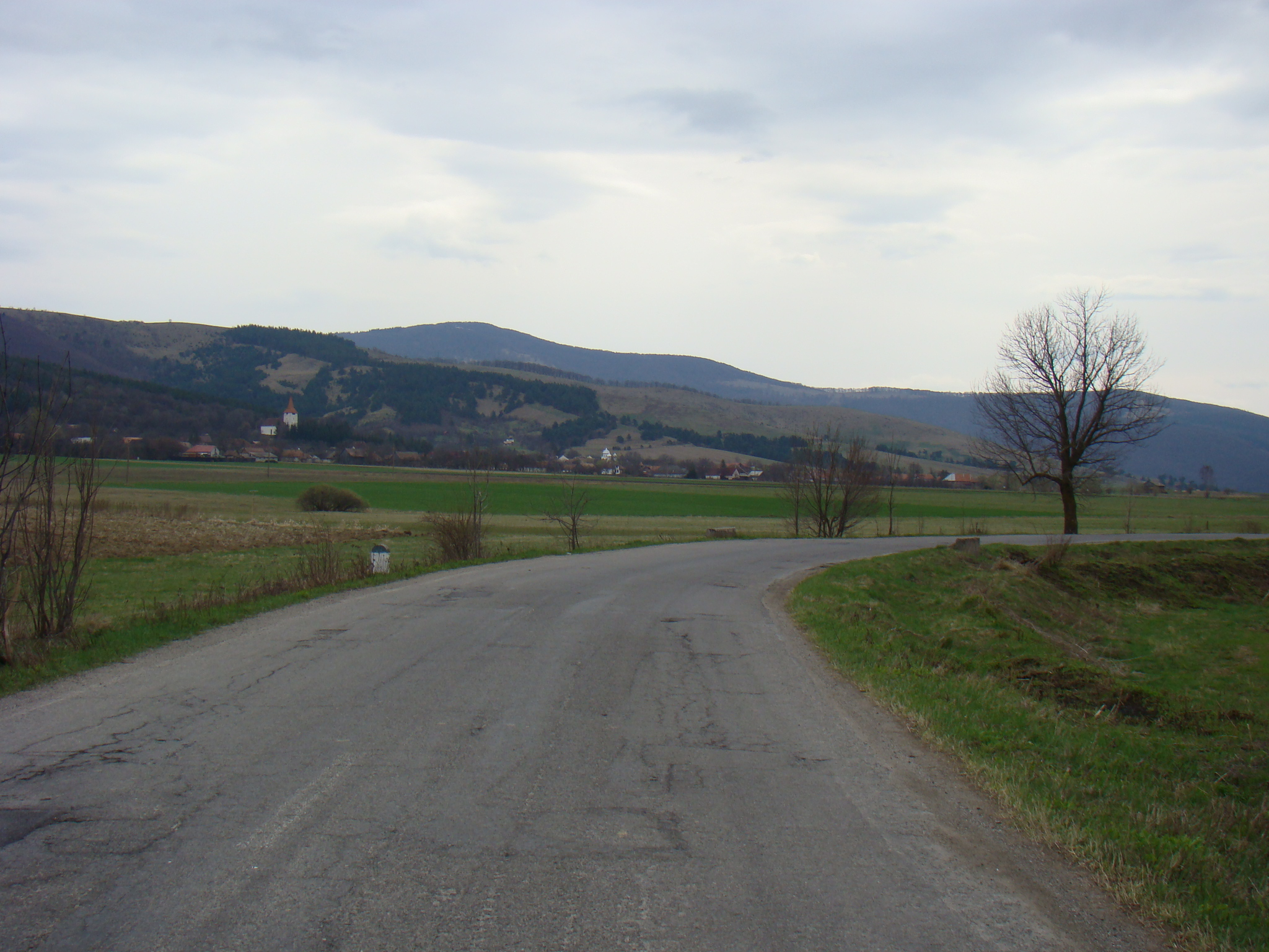 Muntii Intorsurii si satul Dobarlau